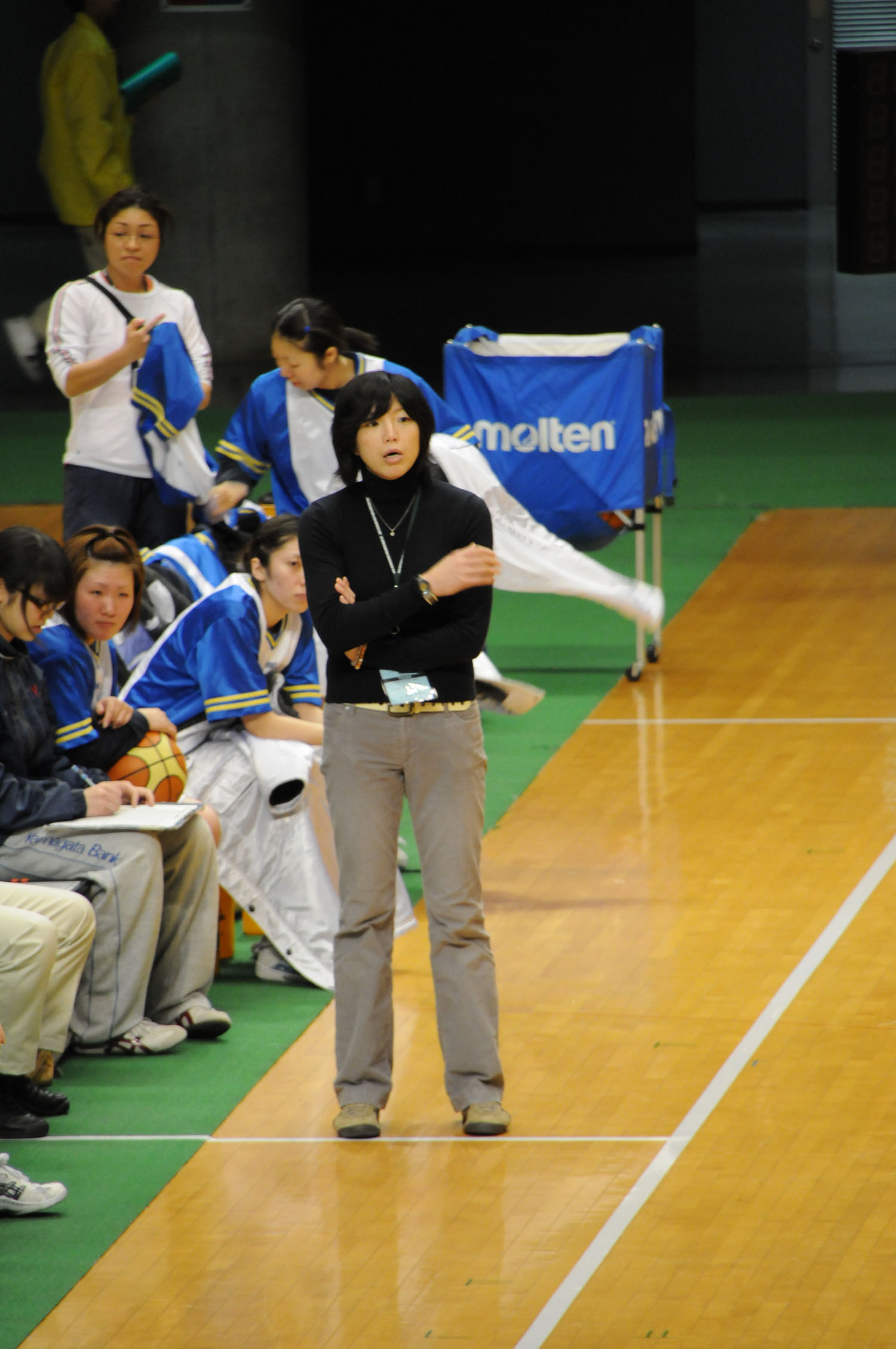 山形銀行、山田かがりヘッドコーチ。東京体育館で。